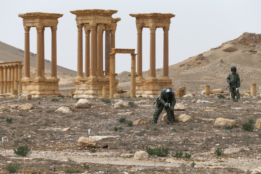 Работа зарубежных СМИ в Пальмире (Сирийская Арабская Республика)